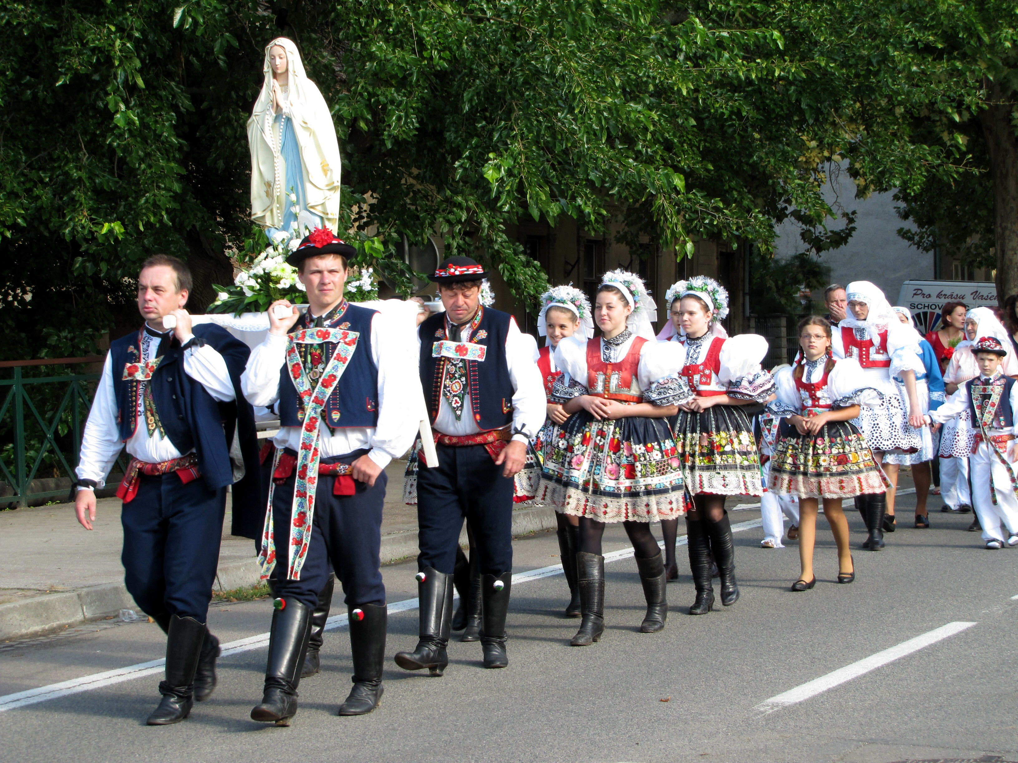 Mariánská pouť na Slováckém roku 2011 v Kyjově